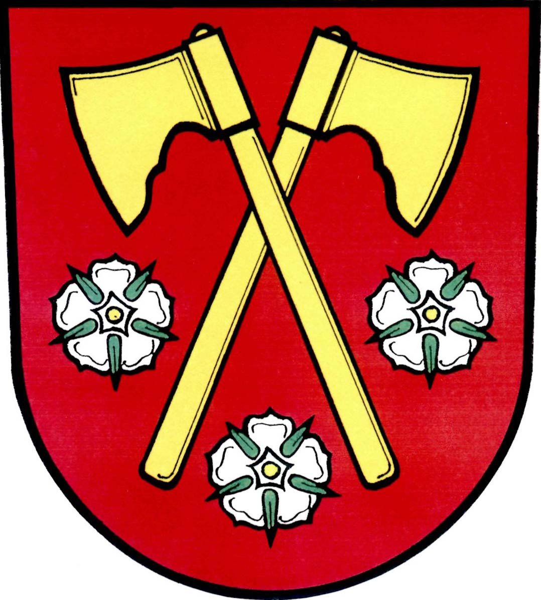 Znak obce Skorošice